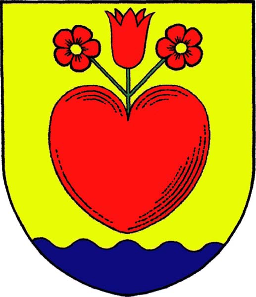 Znak obce Křetín